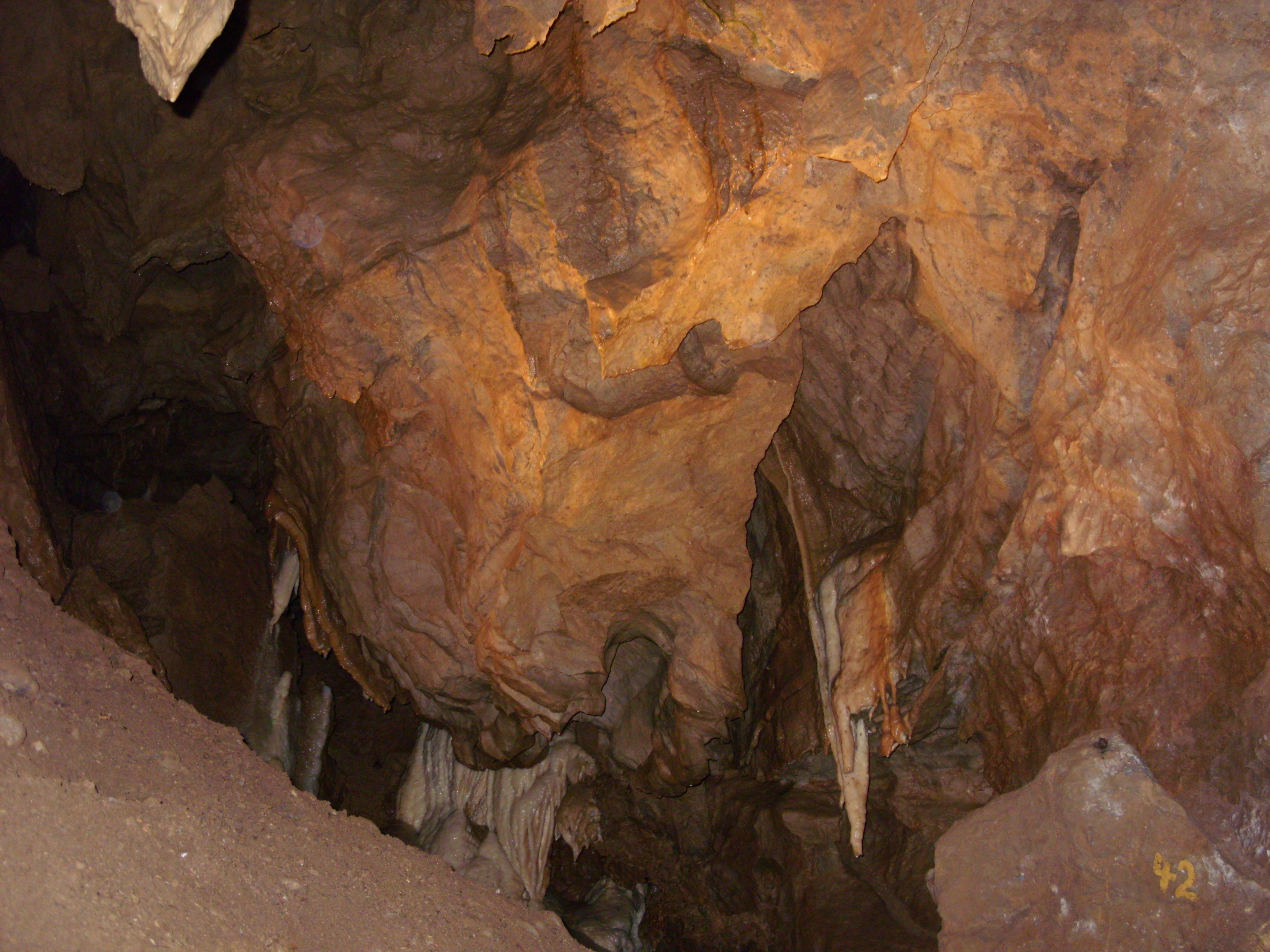 Bystrianska jaskyňa